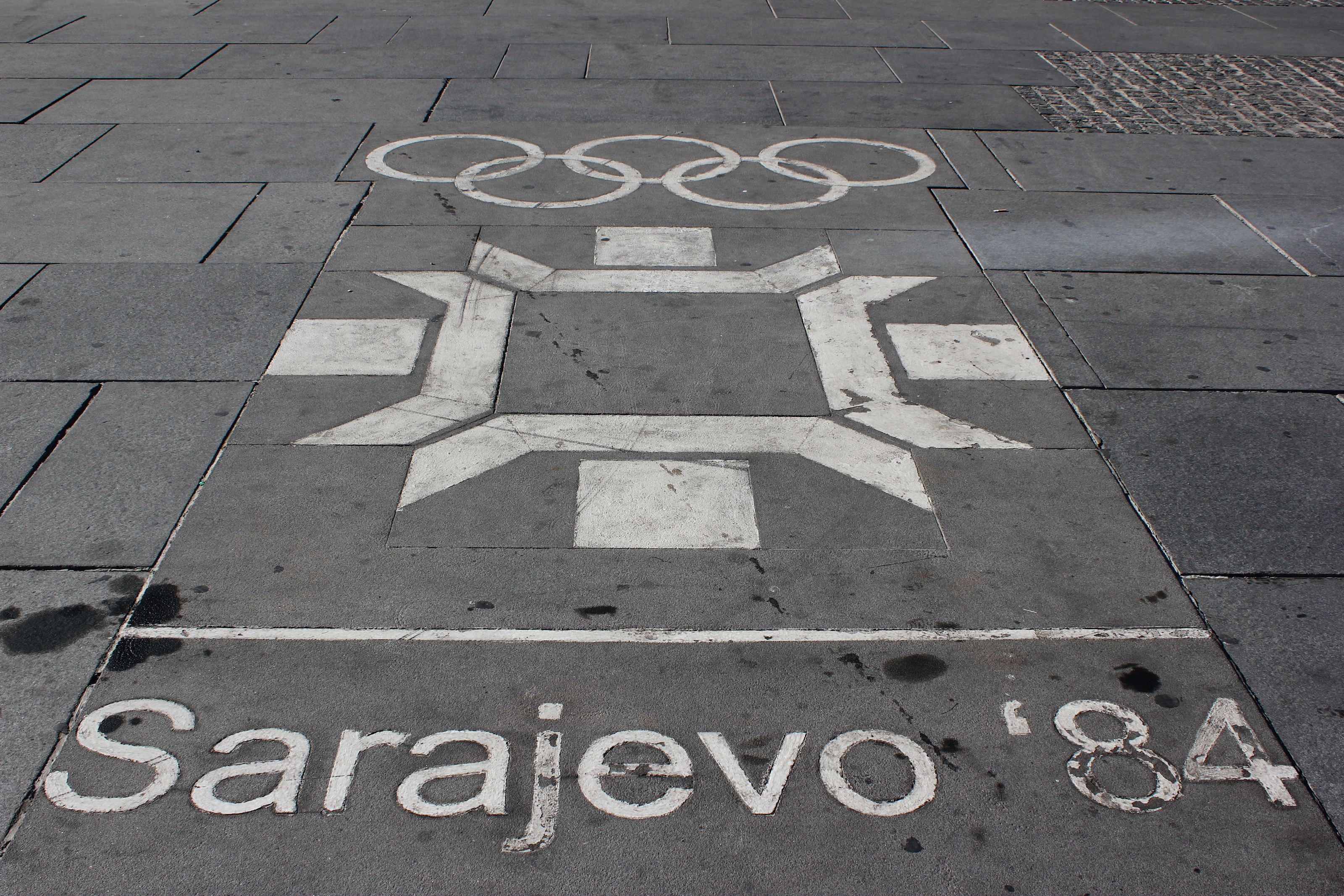 Das Logo der Olympischen Winterspiele 1984 auf einem Platz im Stadtzentrum von Sarajevo.